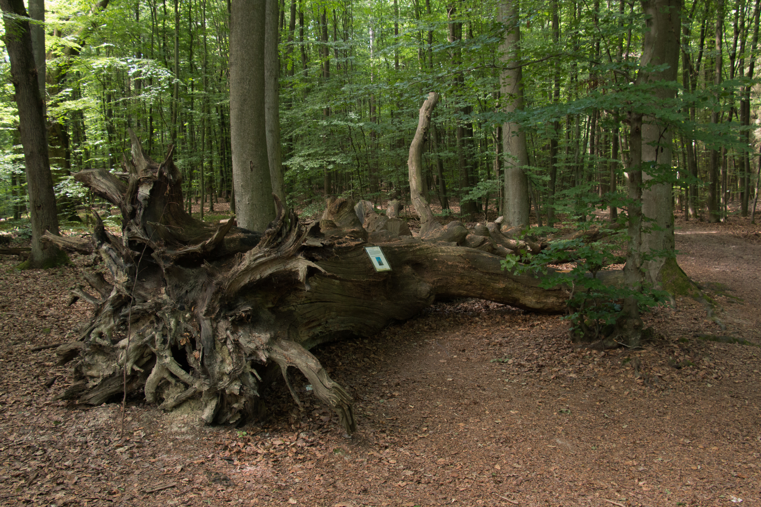 Das Naturdenkmal Monstranzenbaum, eine mittlerweile abgestorbene Stieleiche im Naturpark Rhein-Taunus